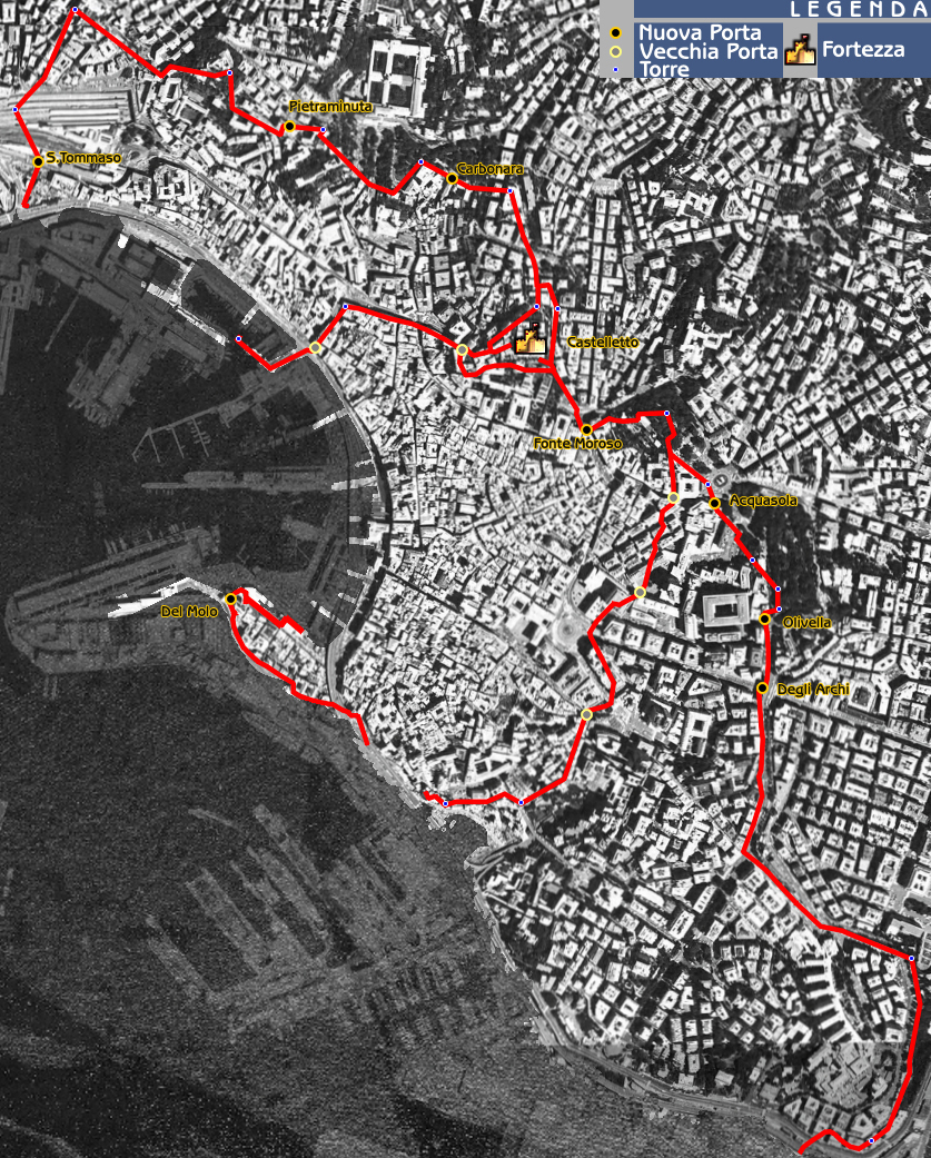 Murallas de Génova